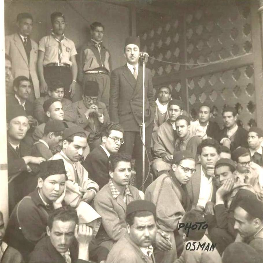 الزعيم المنجي سليم يخطب في إضراب الجوع الذي شنّه الطلبة الزيتونيون يومي 21 و22 أفريل 1950 ويبدو في الصورة جالسا على يمين الخطيب صالح بن يوسف وبجانبه عزوز الرباعي وعبد الكريم قمحة وأمامهما عبد العزيز العكرمي وعلى يمينه عبد الله بوبكر وعلى يسار الخطيب عمر شاشية وأمامه عبد الرحمان الهيلة